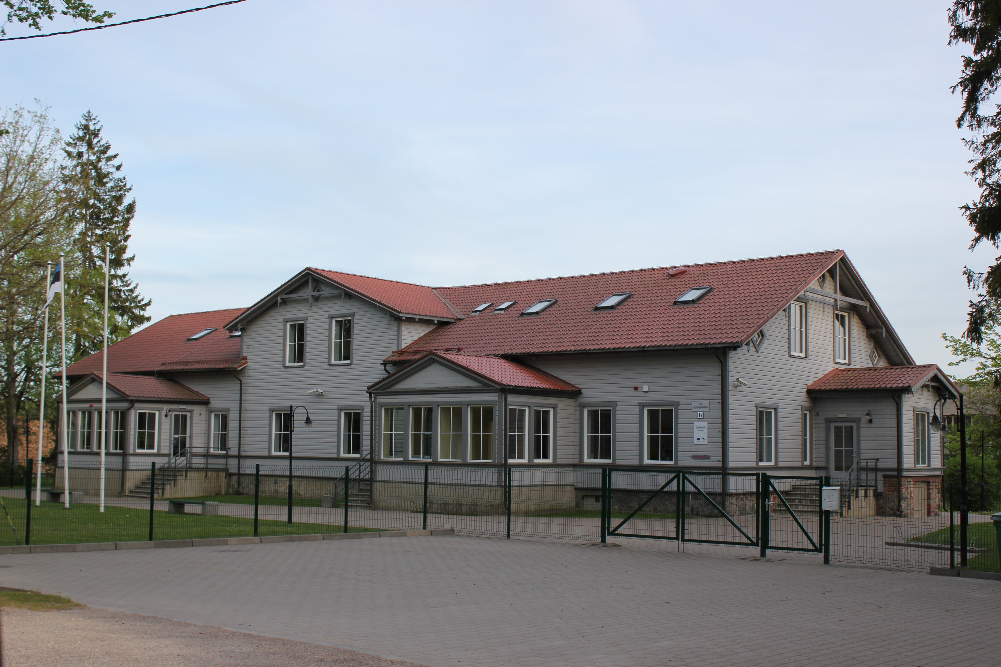 Türi Toimetulekukooli õppehoone. Varem Türi paberivabriku töölismaja